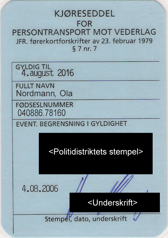 Nb:Manipulert/sensurert versjon av en norsk kjøreseddel for persontransport mot vederlag. En:Manipulated/Sensored version of a norwegian drivingslip/permissionslip for personaltransport against compensation